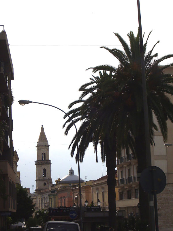 La Chiesa della Madonna del Carmine di Cerignola (FG) vista da Corso G. Garibaldi.